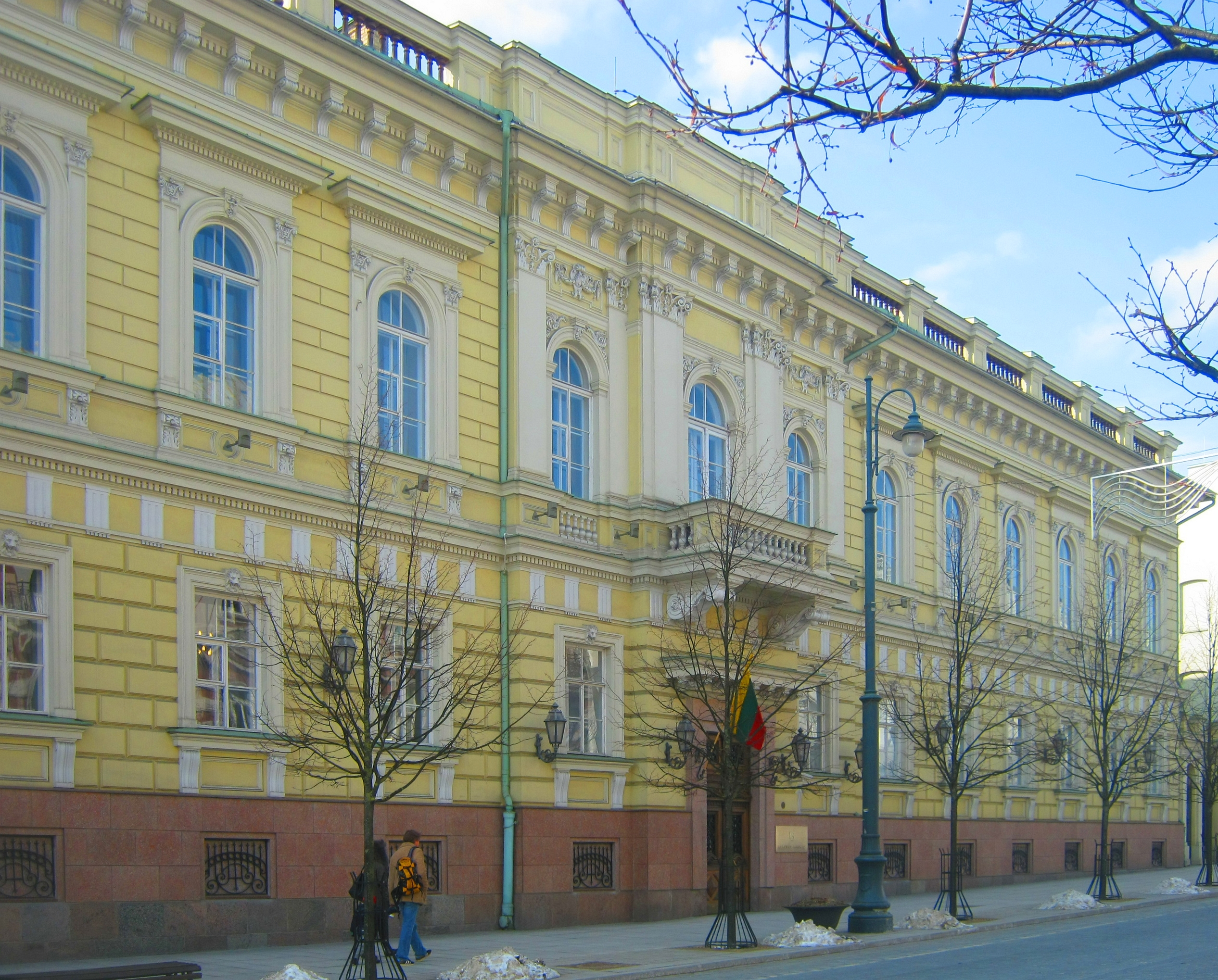 Lietuvos bankas, Vilnius